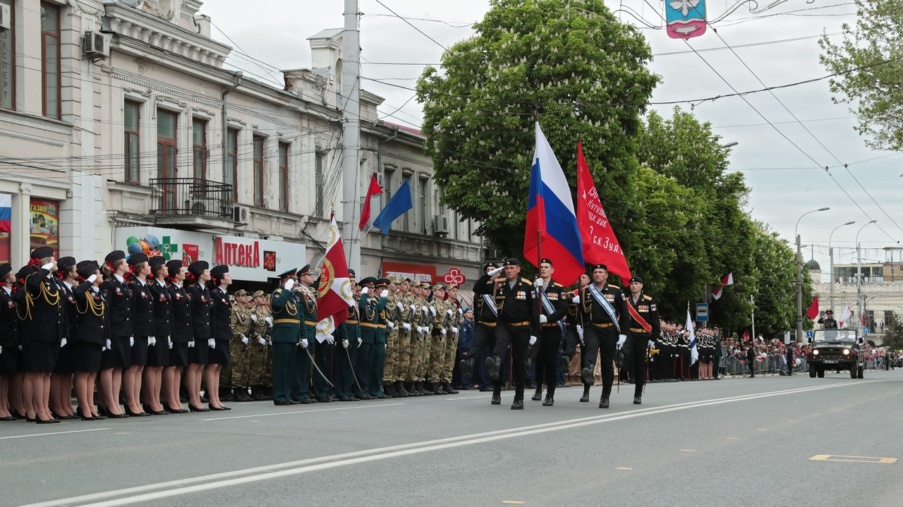 Глава Республики Крым Сергей Аксёнов принял участие в праздничных мероприятиях, посвящённых 74-й годовщине Победы в Великой Отечественной войне, которые состоялись в Симферополе.